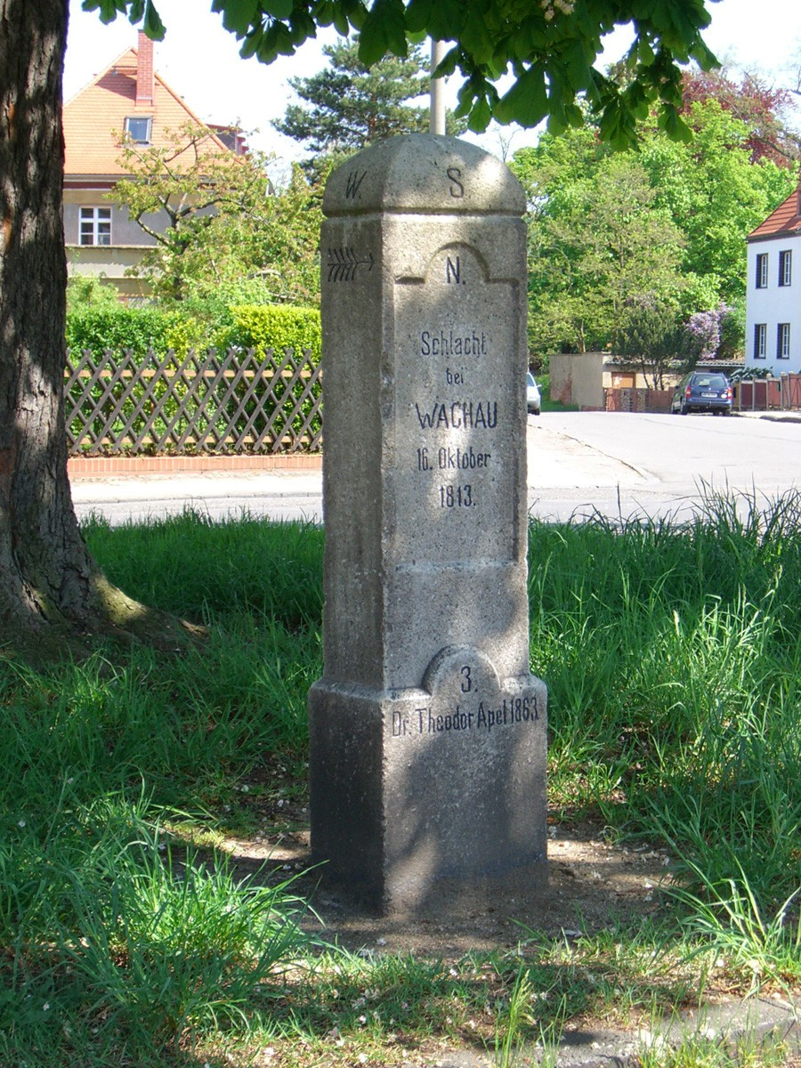 Apelstein Nr. 3 - Zur Erinnerung an die Völkerschlacht bei Leipzig Standort: Dösen, Kreuzung Markkleeberger Str. / Eigenheimstr.